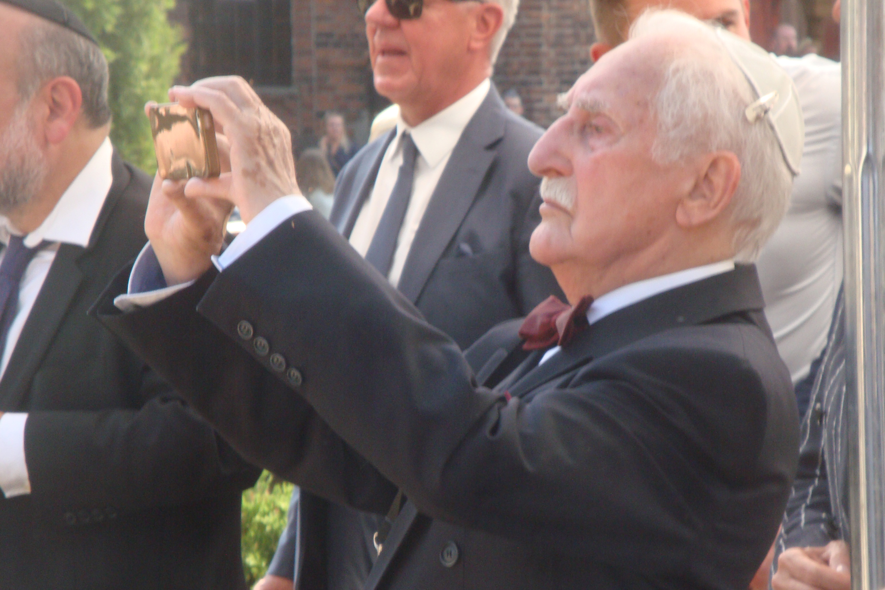 Leon Weintraub dokumentuje obchody 75. rocznicy likwidacji Litzmannstadt Getto 2019 fot M Z Wojalski